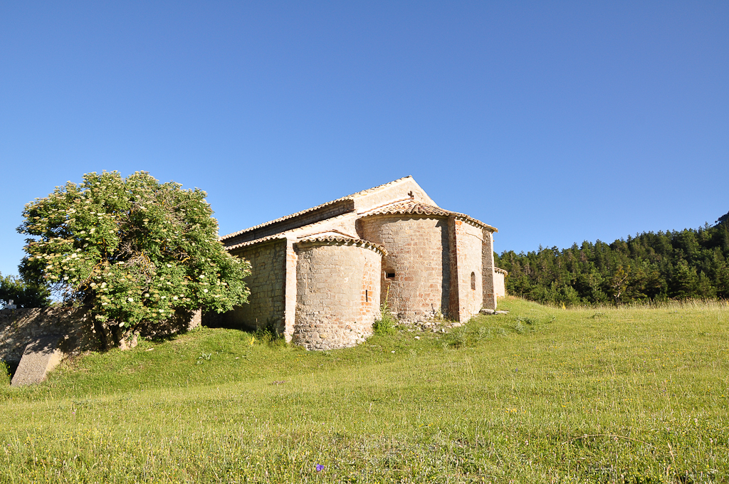 Les trois absides de la chapelle romane de Vergons